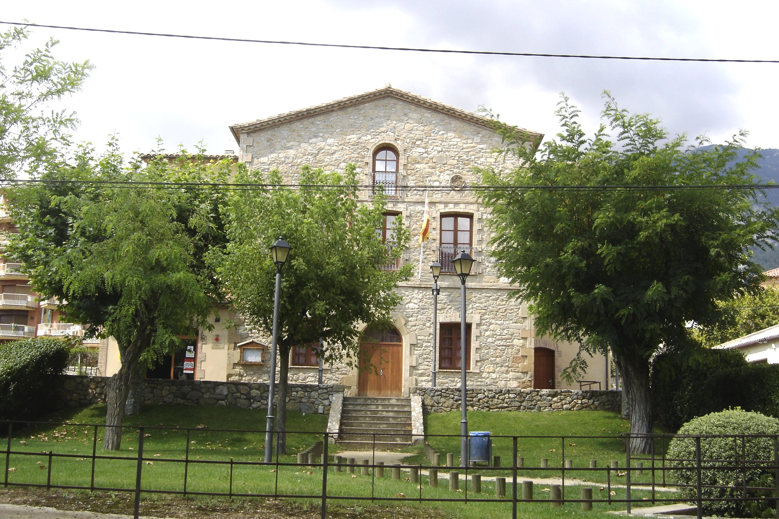 Sant Llorenç de Morunys (Solsonès) - La façana de l'Ajuntament.